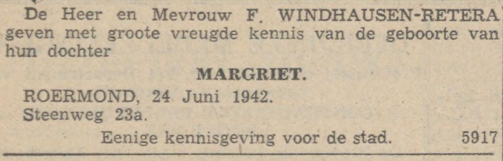 Geboorte Margriet Windhausen. Afkomstig uit De Nieuwe Koerier, donderdag 25 juni 1942, [p. 4].